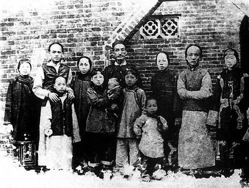 Семья Лян Цичао. Сам юный Лян стоит второй слева.